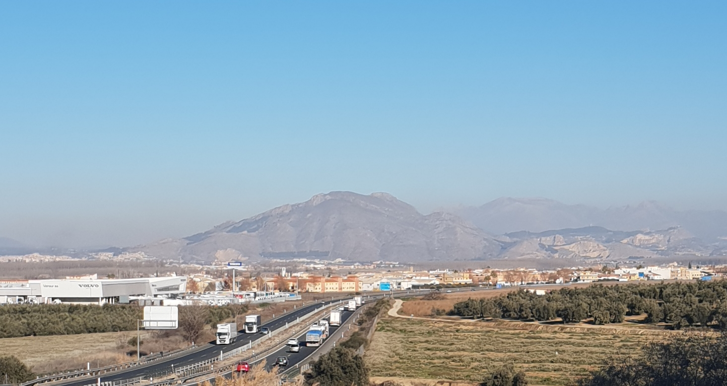 Vista de Cijuela, en la provincia de Granada (España), desde Láchar.